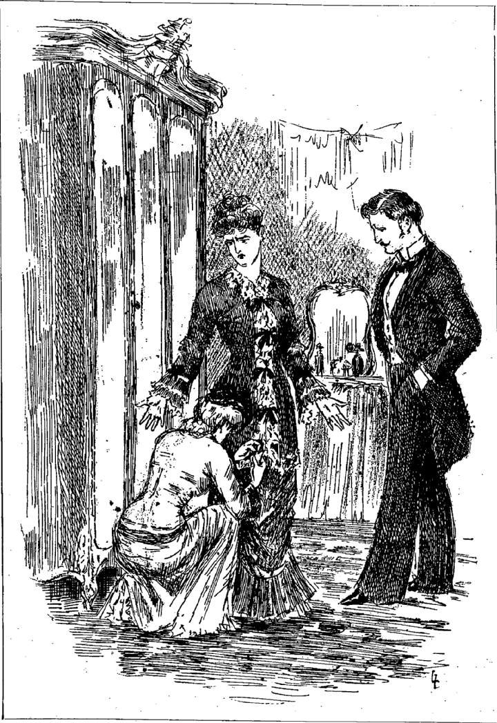 Illustration de Au Bonheur des Dames tirée des Œuvres complètes illustrées de Émile Zola, T1, Fasquelle, 1906, La scène d'Henriette, p.345